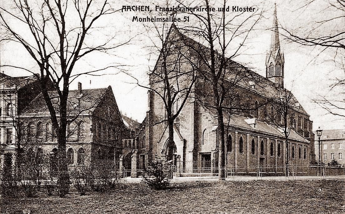 Franziskanerkloster in der Aachener Monheimsallee um 1900